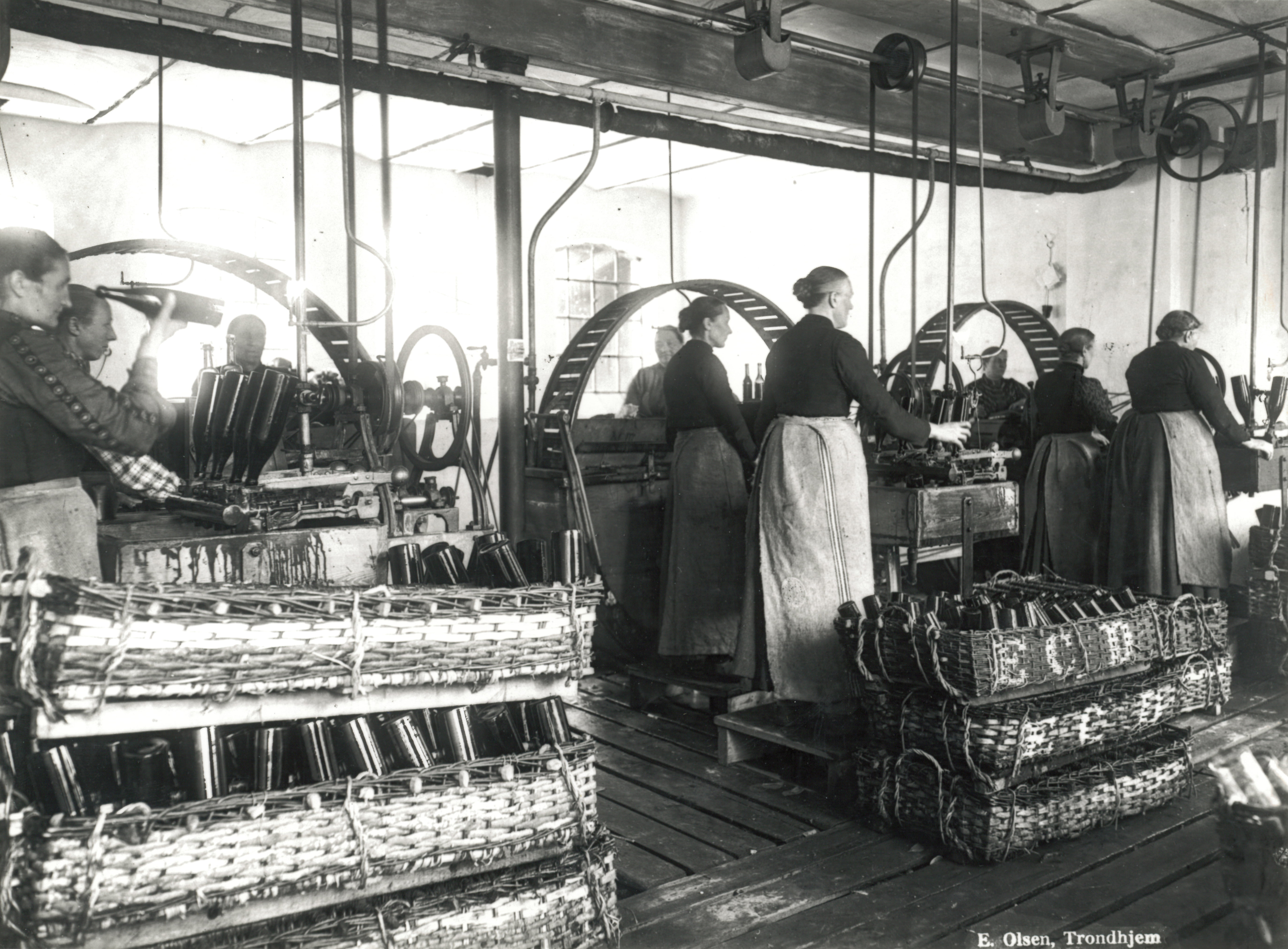 Format: Fotopositiv Dato / Date: 1902 Fotograf / Photographer: Erik Olsen (1835 - 1920) Sted / Place: Trondheim Eier / Owner Institution: Trondheim byarkiv, The Municipal Archives of Trondheim Arkivreferanse / Archive reference: Tor.H4x.Bxx.Fxxxx Merknad: Fotokopi fra en tidligere utstilling. Om fotografen: OLSEN, ERIK - Trondhjem 1869 - ca. 1916/17 f. i Meraker 2.5.1835 - d. i Trondhjem 16.10.1920. Arbeidet først på bergskriverkontoret i hjembygden, var så proviantskriver på Røros i 1863. Hadde deretter forskjellige kontoristjobber til han 1.6.1869 overtok Charles Foss's atelier på Bratøren i Trondhjem (Meisterlins Gaard) etter å ha gått i lære hos ham. I 1882 (muligens allerede i 1879) kjøpte han Søndre Gade 6 og flyttet atelieret dit i 1883. Fra 1902 var han i Olaf Trygvesøns Gade 21, og fra 1910 i Schultzgd. 7. Han var Domkirkens faste fotograf fra 1870 til ca. 1916/17. Endel av platene hans ble i 1895 av F. Scarlett laget til lysbilder til bruk for turistreklame, noen av dem ble farvelagt av den engelske kunstmaler Acres i London. Blant disse var noen fra Værdalsulykken. De gikk dessverre tapt på Norwegische Reisebureau i Berlin i 1944. Noen av hans plater ble (antakelig sammen med platene etter Charles Foss) overlatt til Trondhjems Historiske Forening. Platene og protokollene eies nu av Videnskabsselskabet, Museet. På Bergensutstillingen i 1898 stilte han ut "Fotografier, fra Visitkortformat til Legemsstørrelse". Han var formann i Nordenfjeldske Fotografers Forening ca. 1905/06, og ble æresmedlem der i 1913. Ivrig skiløper til langt opp i alderdommen. Hentet fra Bonge, Susanne: Eldre norske fotografer. Fotografer og amatørfotografer i Norge frem til 1920 (Universitetsbiblioteket i Bergen, 1980)